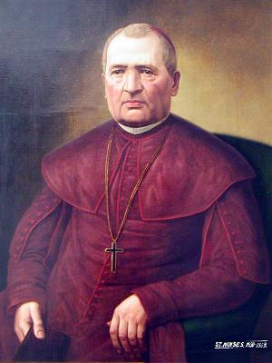 Štefan Moyzes. Portrét od J.B. Klemensa z roku 1871.